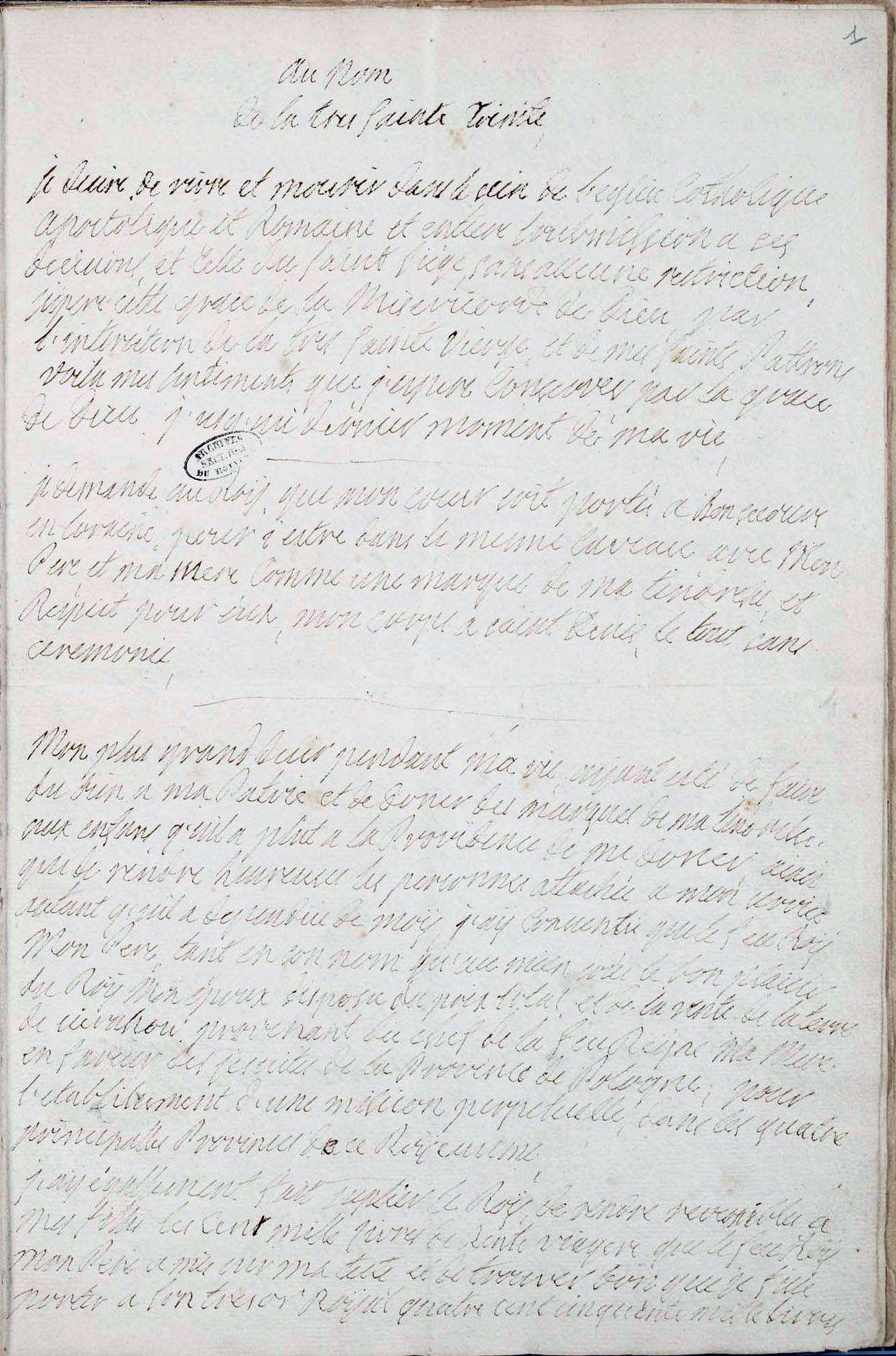 Testament de la reine Marie Leszczynska, daté de Versailles, le 24 juin 1767, et son codicille, daté de Versailles, le 15 janvier 1768.